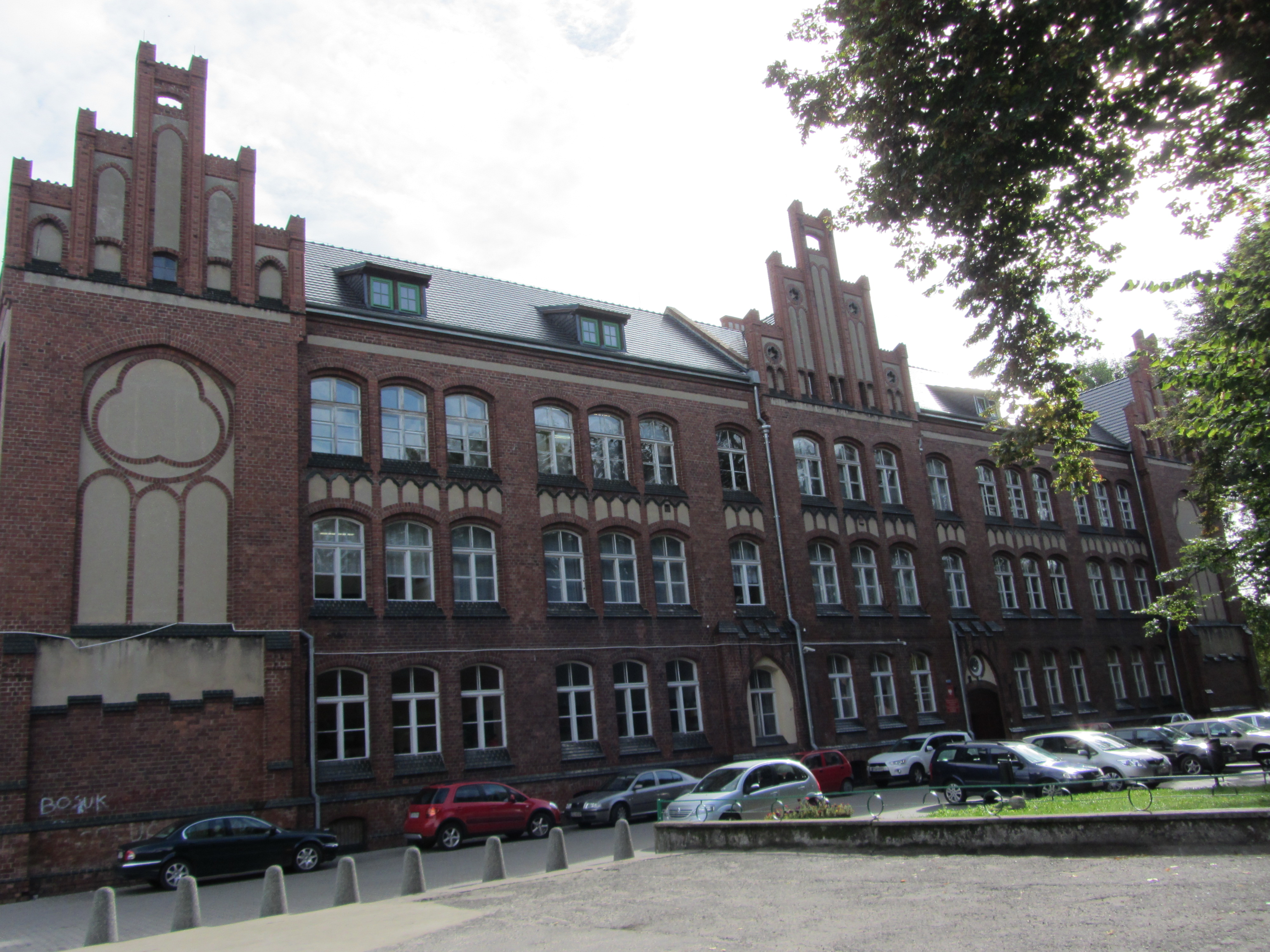 Świebodzin, Park Chopina 2 - szkoła dla dziewcząt, ob. L.O., 1869